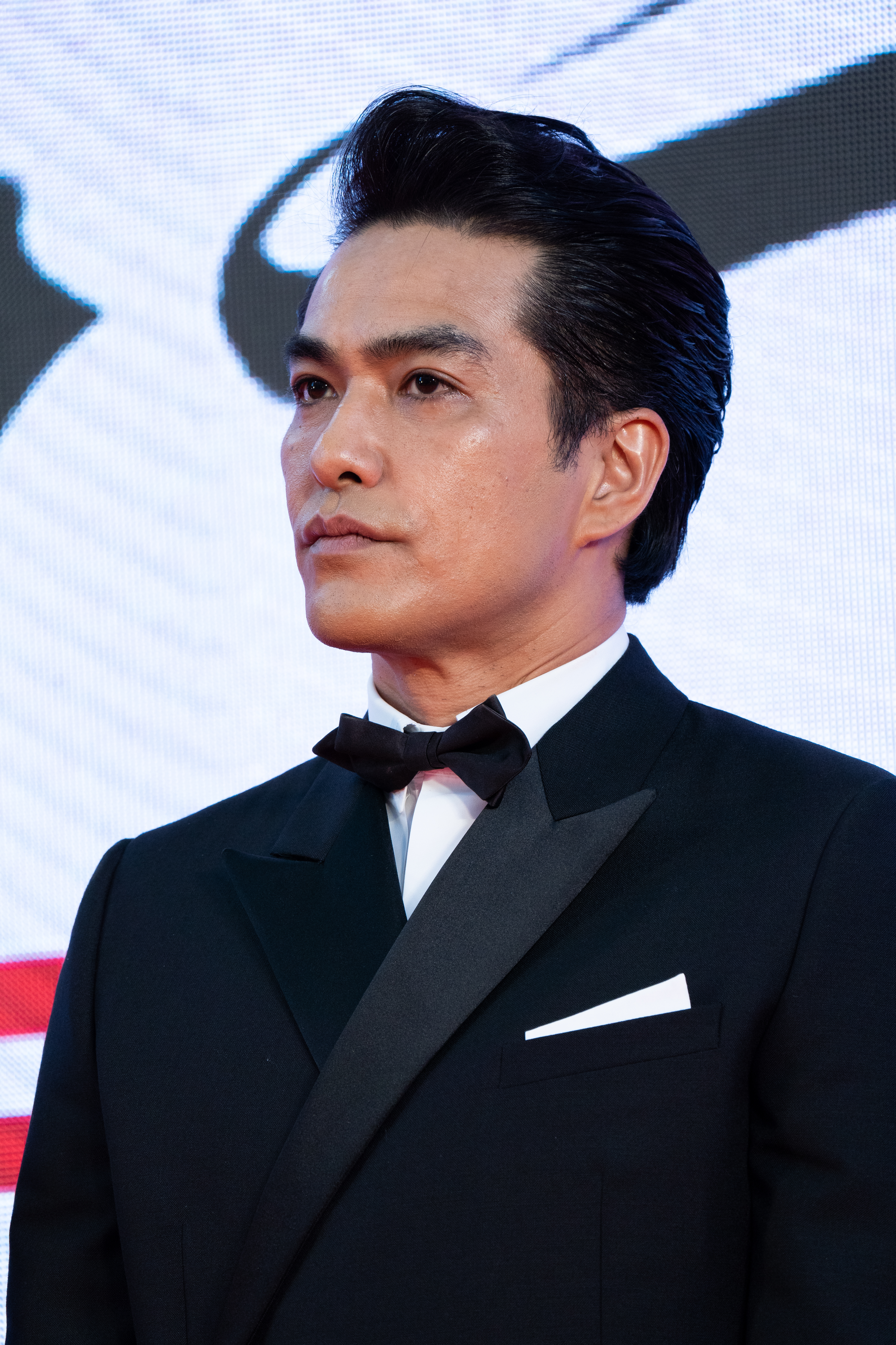 第32回 東京国際映画祭 オープニングセレモニー 北村一輝 (フォークロア TATAMI)